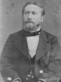 Paul Beck, Amtsrichter und Landeshistoriker